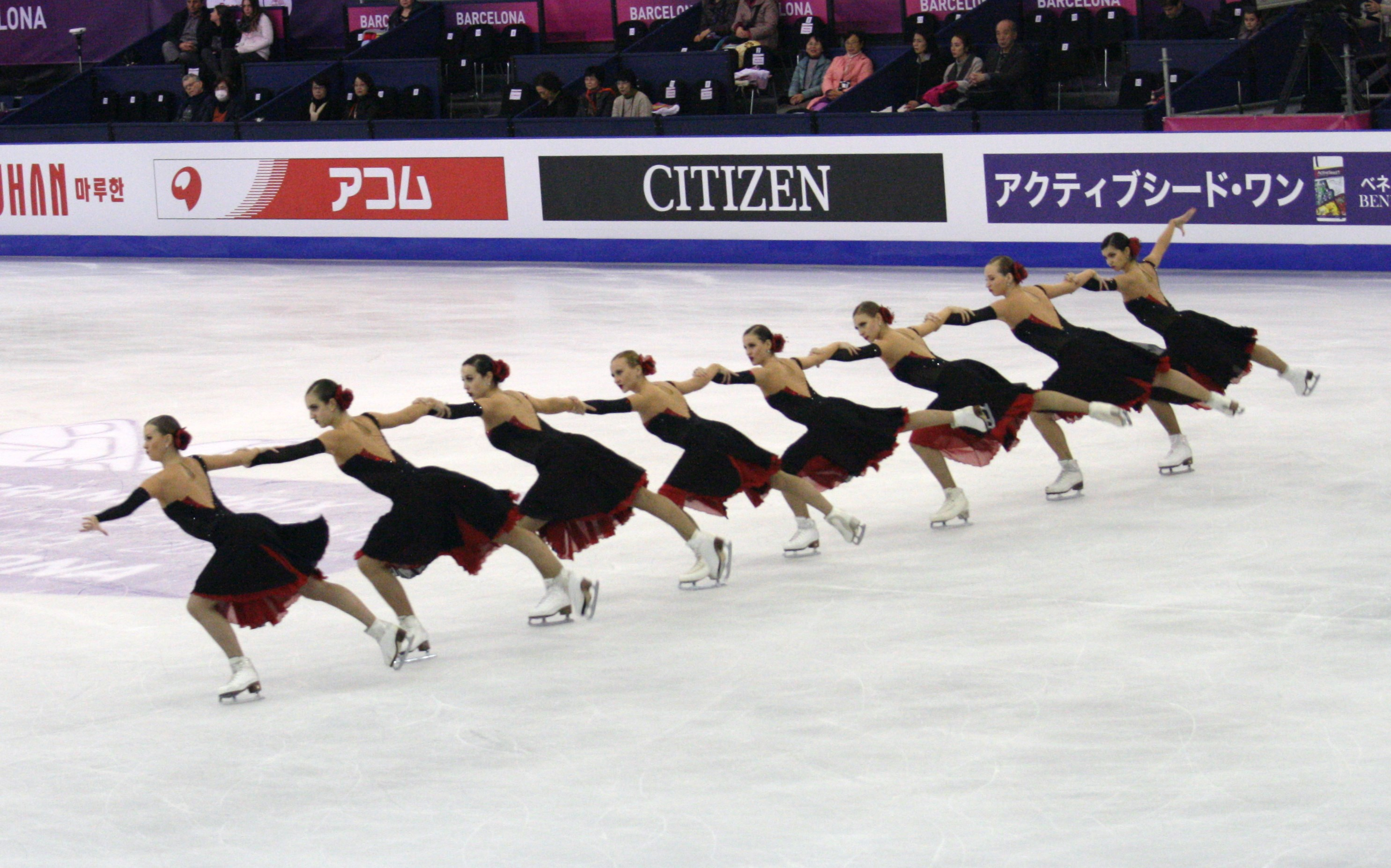 Команда Paradise (Россия) на финале Гран-при по фигурному катанию 2015-2016.